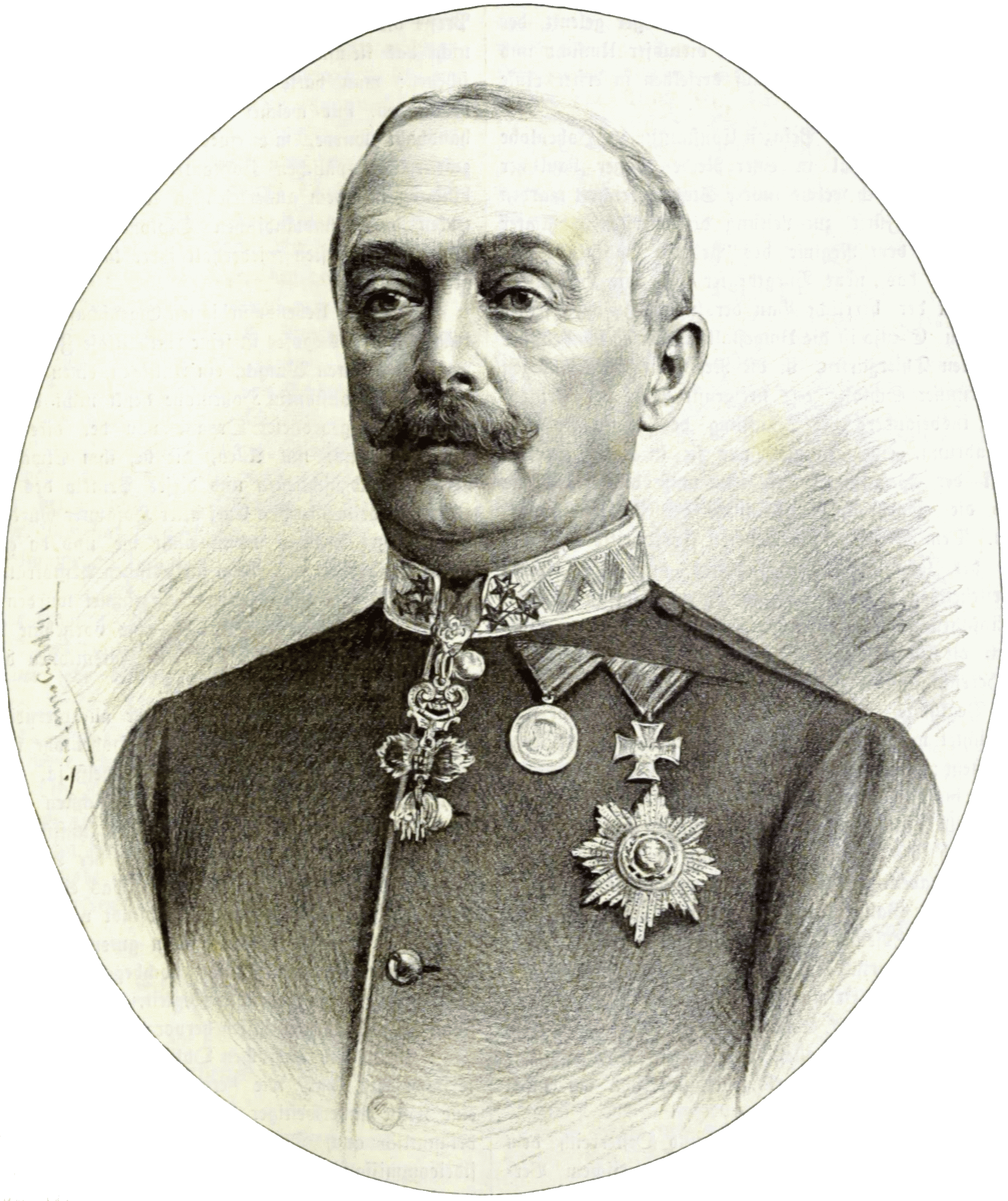 Konstantin Prinz zu Hohenlohe-Schillingsfürst (1828–1896), German aristocrat, Austrian general